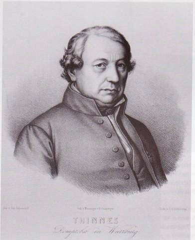 Friedrich Thinnes (1790-1860), Domkapitular in Speyer, Eichstätt und Würzburg, Abgeordneter im Paulskirchenparlament und im Bayerischen Landtag.